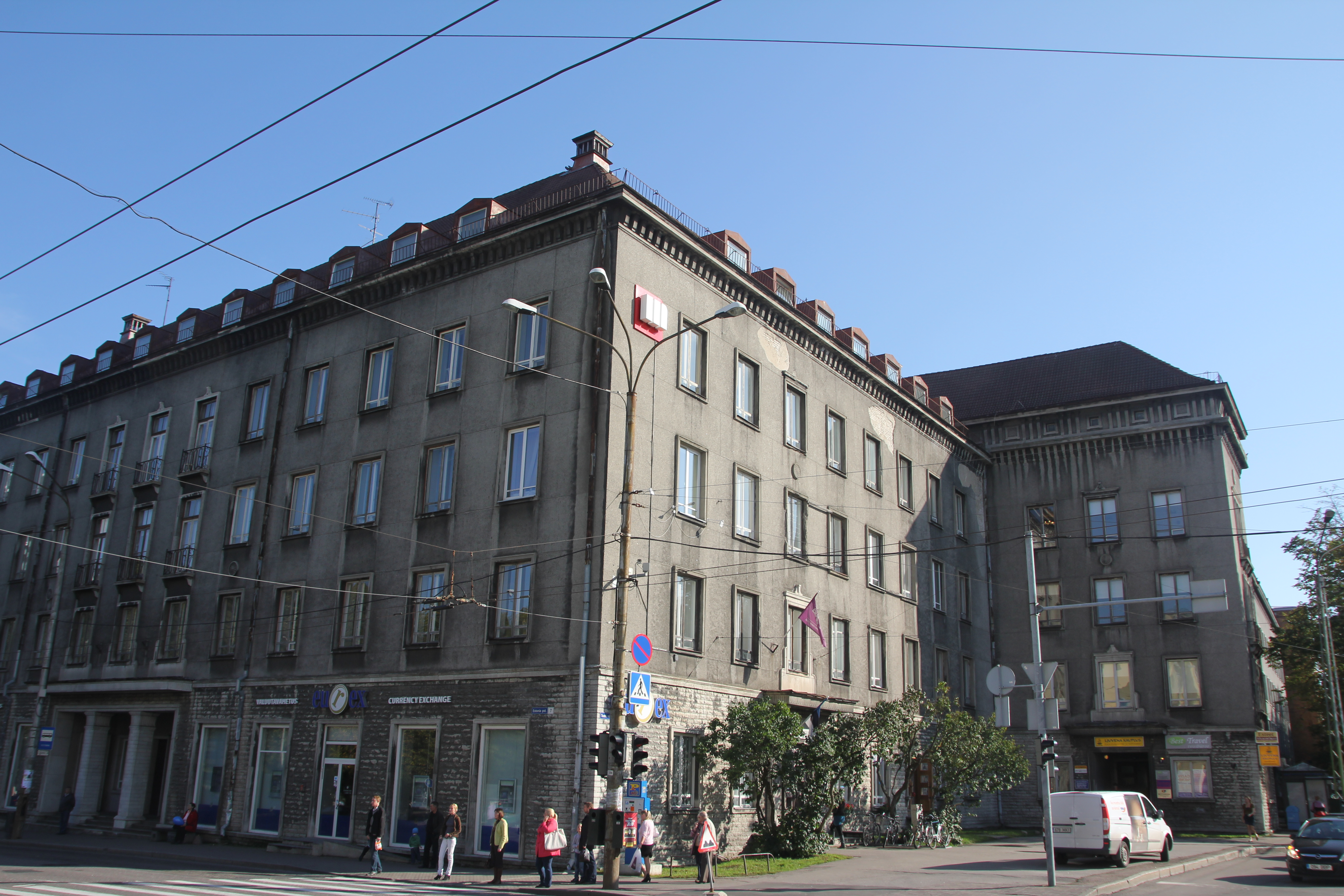 Teaduste Akadeemia hoone